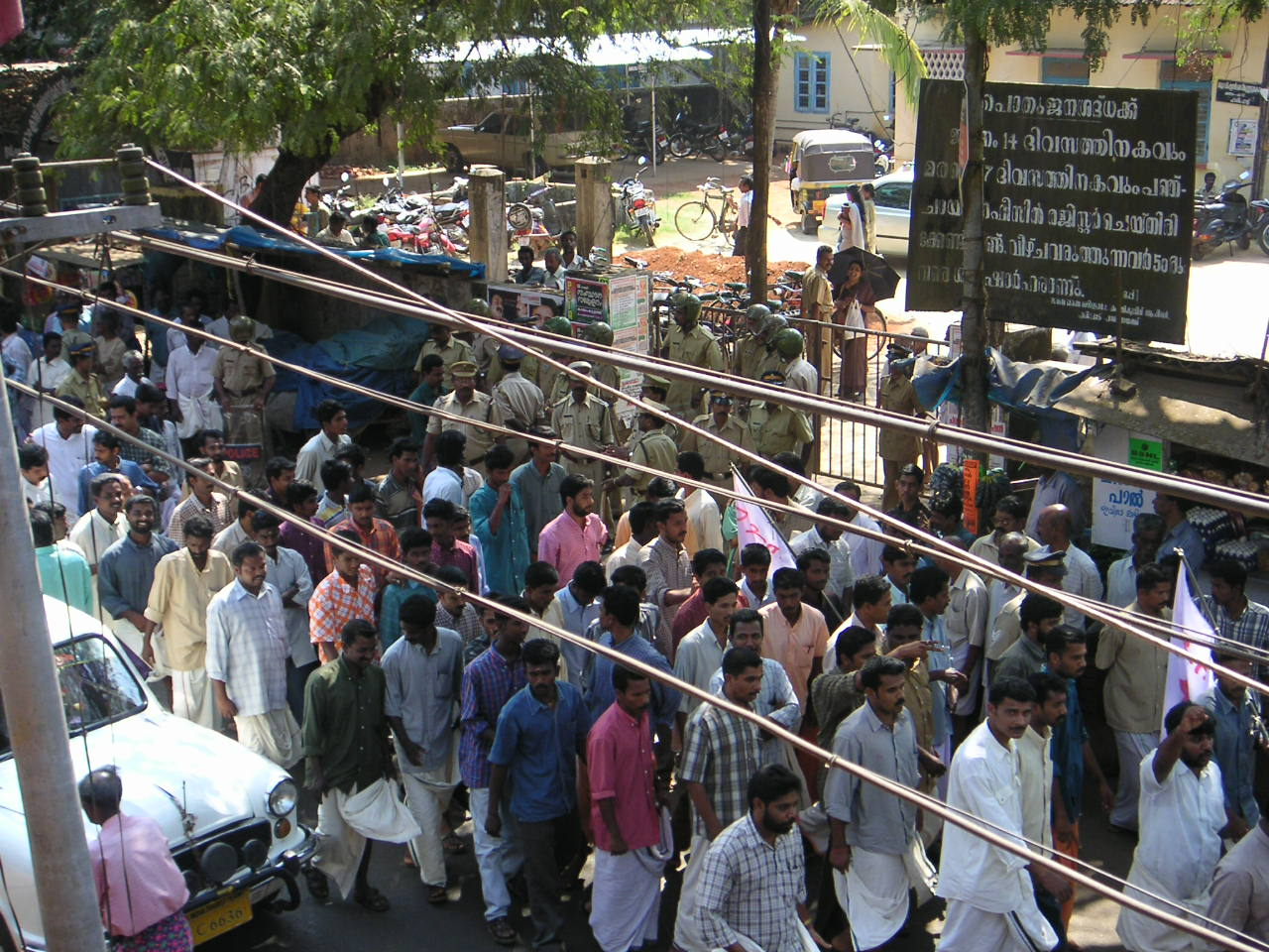 DYFI rally against unemployment in Haripada, Kerala, India. Photo: Soman